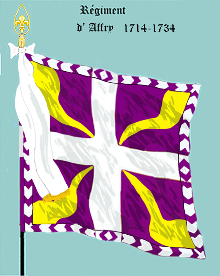 Ordonnanzfahne eines Fremdenregiments im königlich französischen Dienst. (Schweizer Regiment) - Entnommen und überarbeitet aus: „LES UNIFORMES ET LES DRAPEAUX DE L'ARMÉE DU ROI“ Marseille 1899. - Drapeau d'Ordonnance d' un régiment étranger au service française (régiment suisse.)